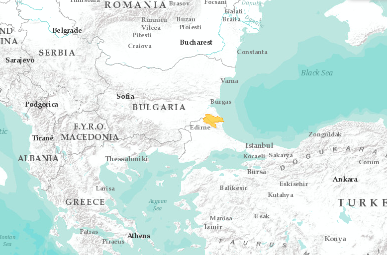 Карта поширення Alburnus schischkovi за даними МСОП: Alburnus schischkovi